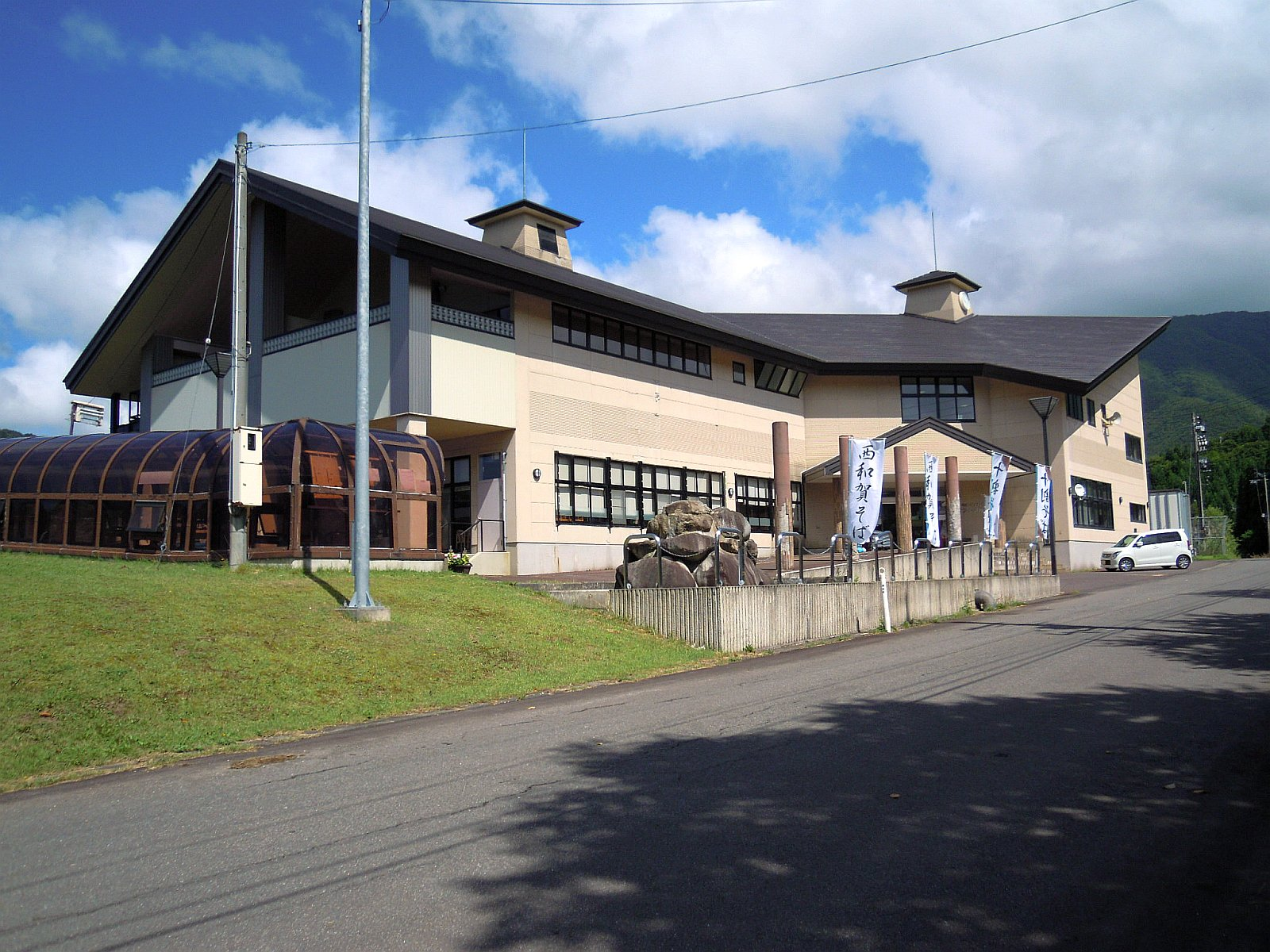 岩手県和賀郡西和賀町の峠山パークランドオアシス館の外観